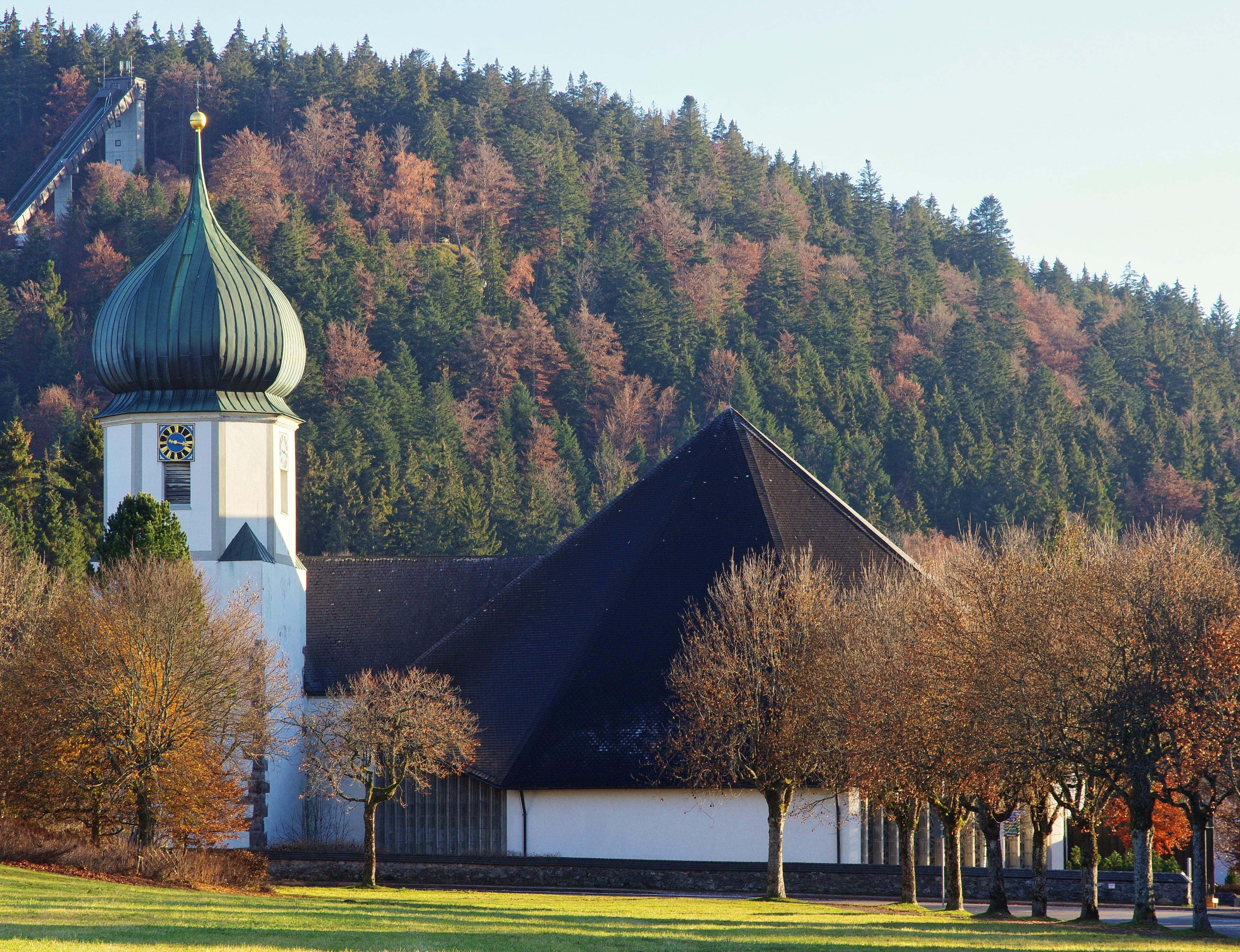 Blick auf die Pfarrkirche Maria in der Zarten in Hinterzarten